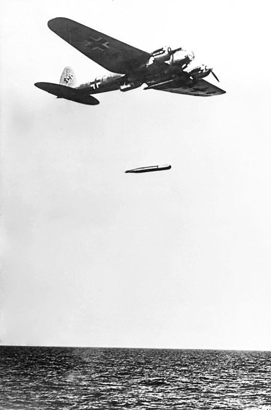 Torpedoangriff mit Heinkel He 111 Torpedoangriff. Ein Flugzeugtorpedo fällt, der Zweite ist noch unter dem Flugzeug sichtbar. 10.10.41 22-41 ADN-ZB/Archiv II. Weltkrieg 1939-45 Ein mit Torpedos ausgerüstetes Kampfflugzeug vom Typ He 111 der faschistischen deutschen Luftwaffe während eines Anfriffs. Aufnahme: Stöcker/Herbst 1941 9223-41